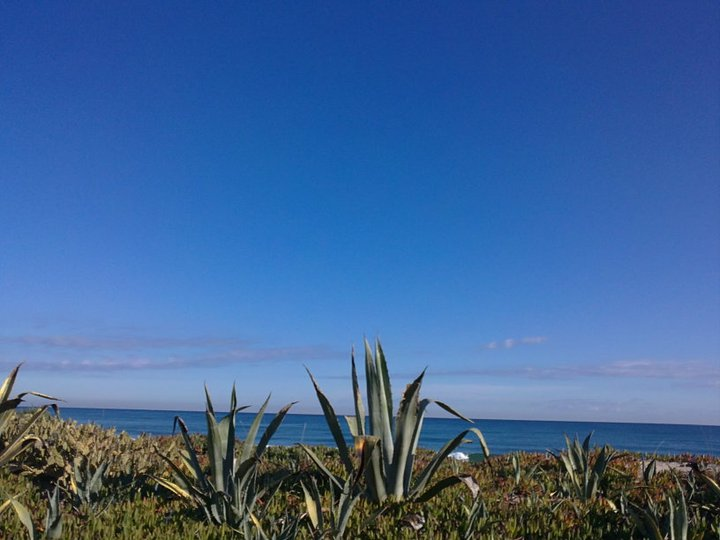 Cordón dunar que hace de la playa de El Mareny de Barraquetes, una playa única.